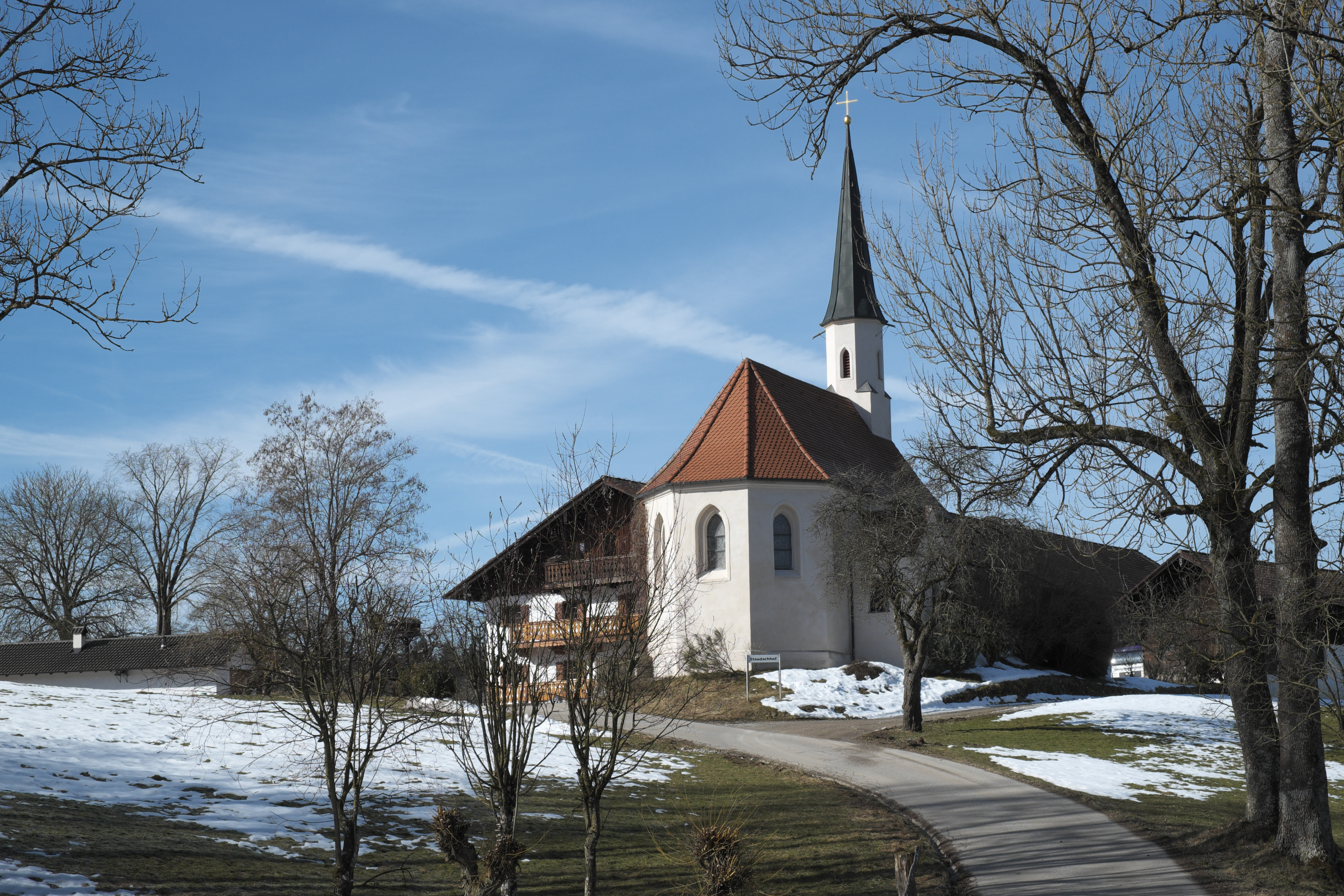 Katholische Filialkirche St. Vitus in Stauchdach (Stauder Hof), einem Ortsteil von Münsing im Landkreis Bad Tölz-Wolfratshausen (Bayern/Deutschland)